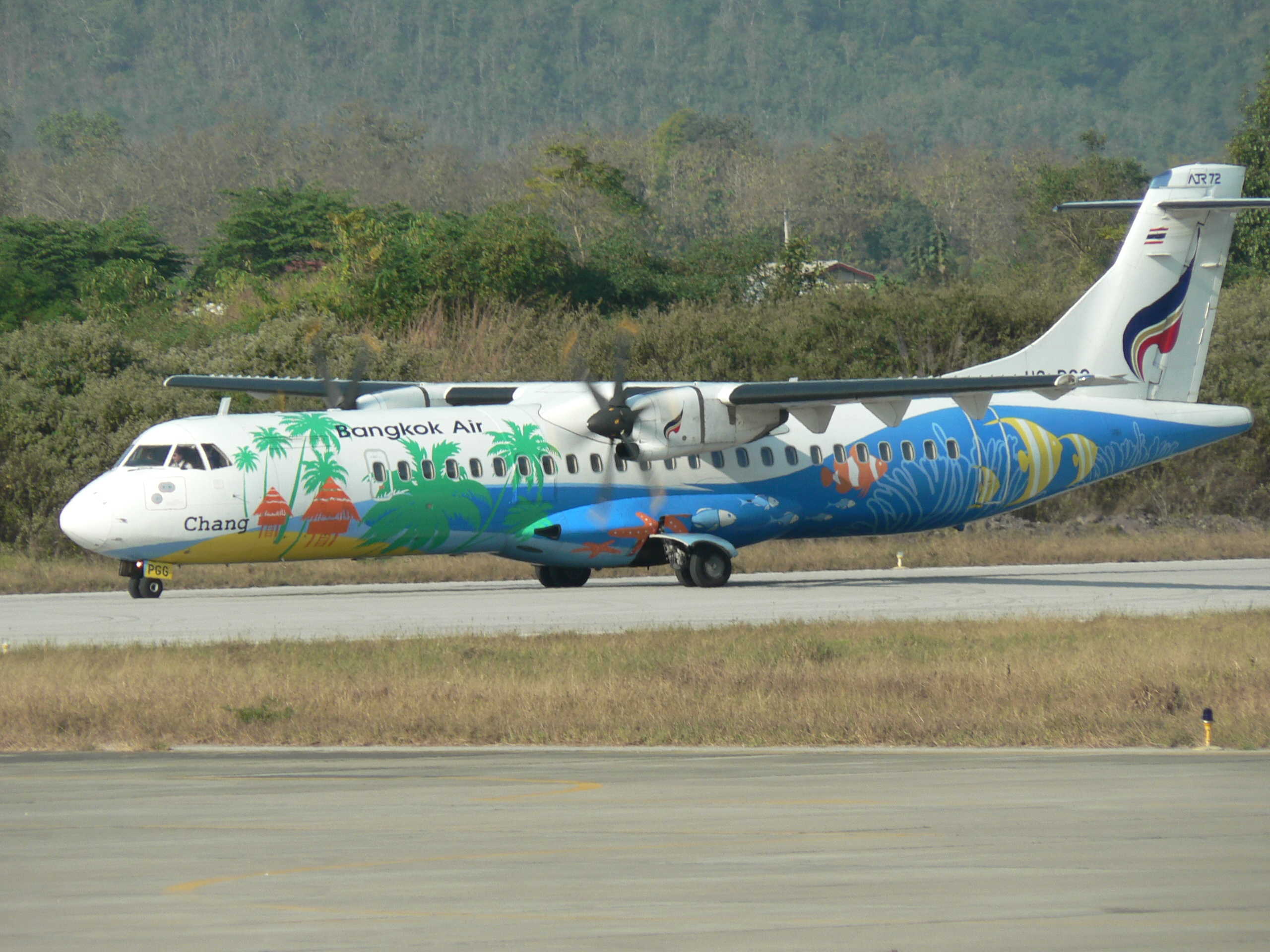 Bangkok Airways ATR-72 at Luang Prabang International Airport